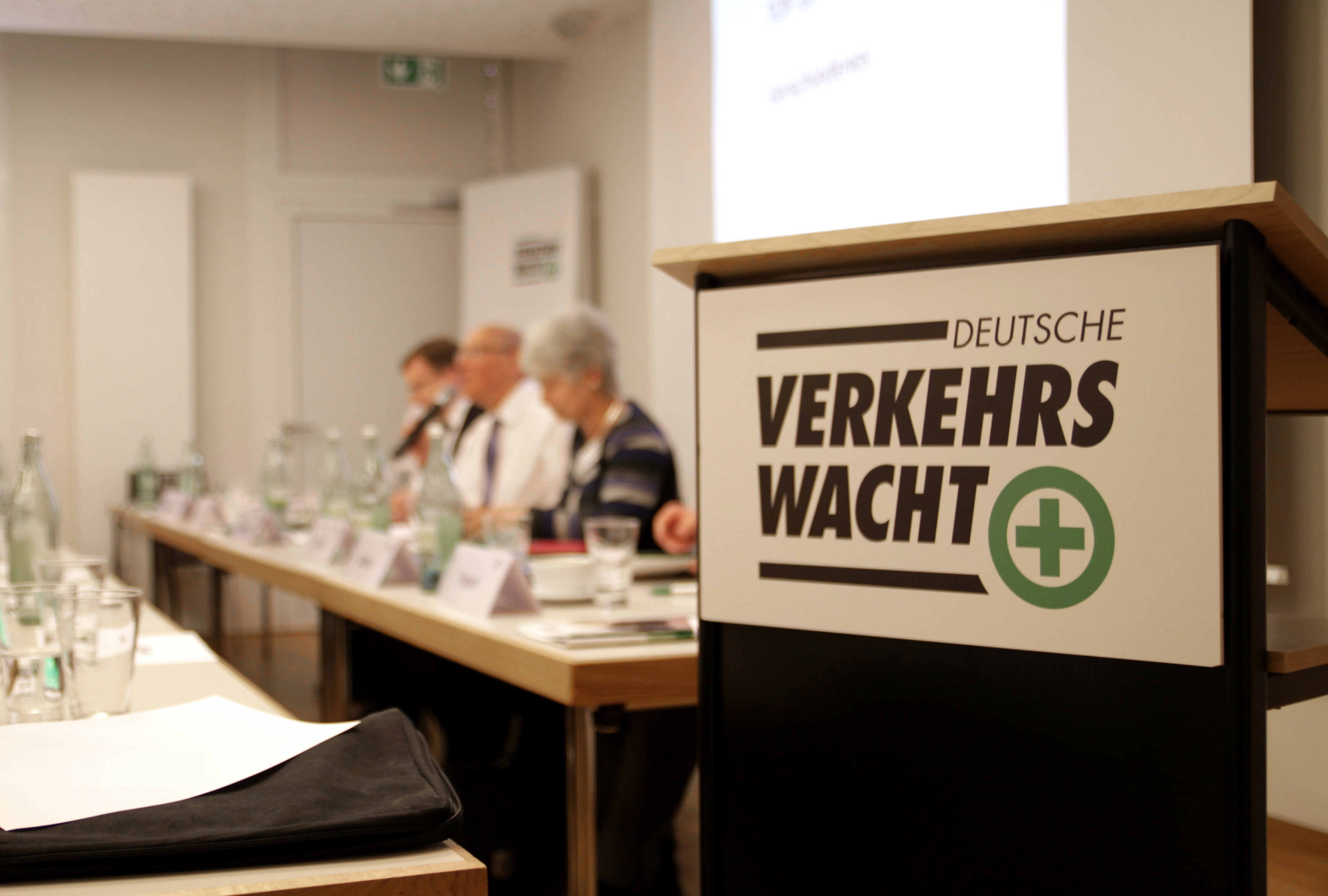 Rednerpult mit dem DVW-Logo (ab 2016) auf der Jahreshauptversammlung 2017 in Würzburg